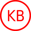 神戸電鉄の路線記号。DejaVuフォントで作成